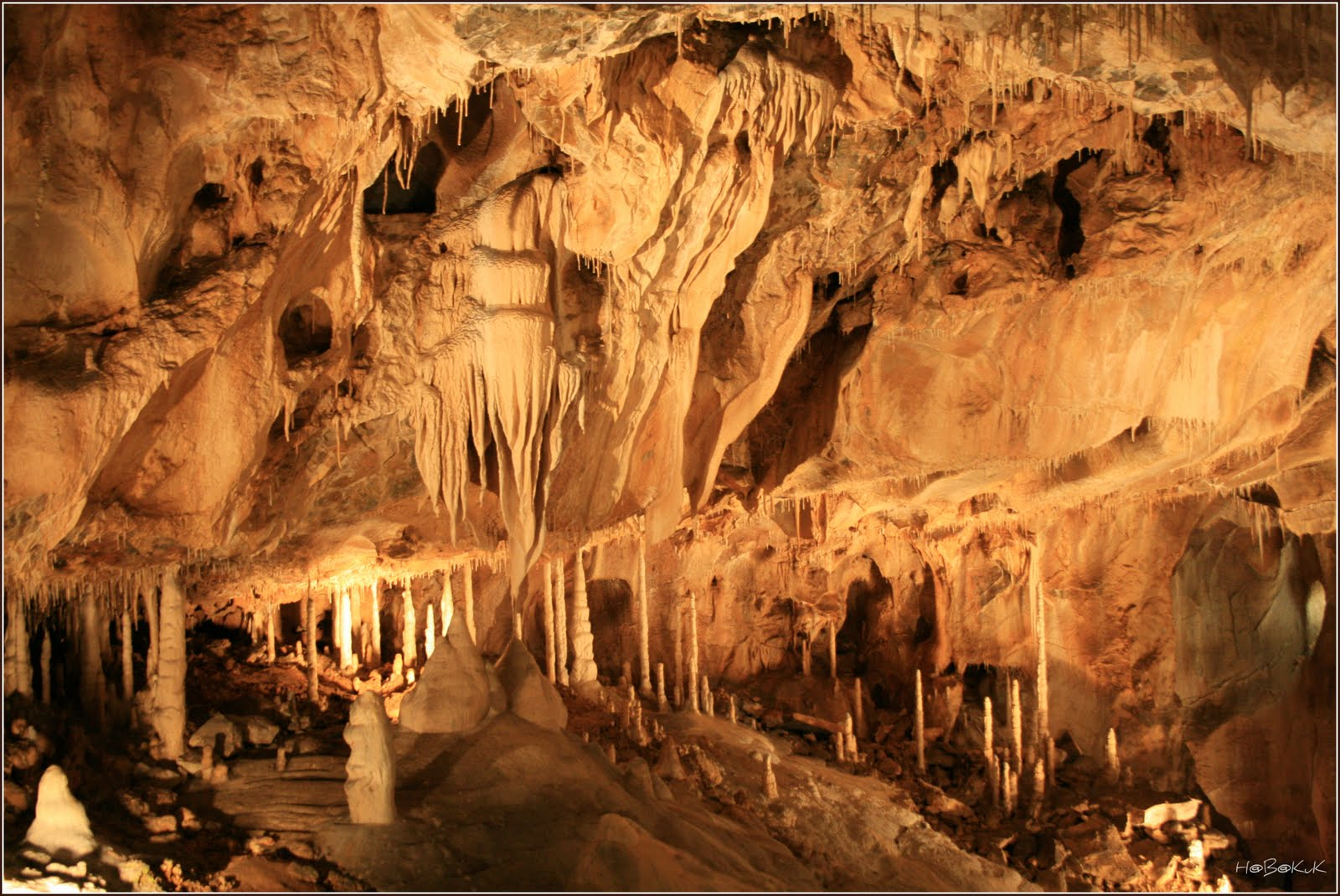 Javoříčko caves